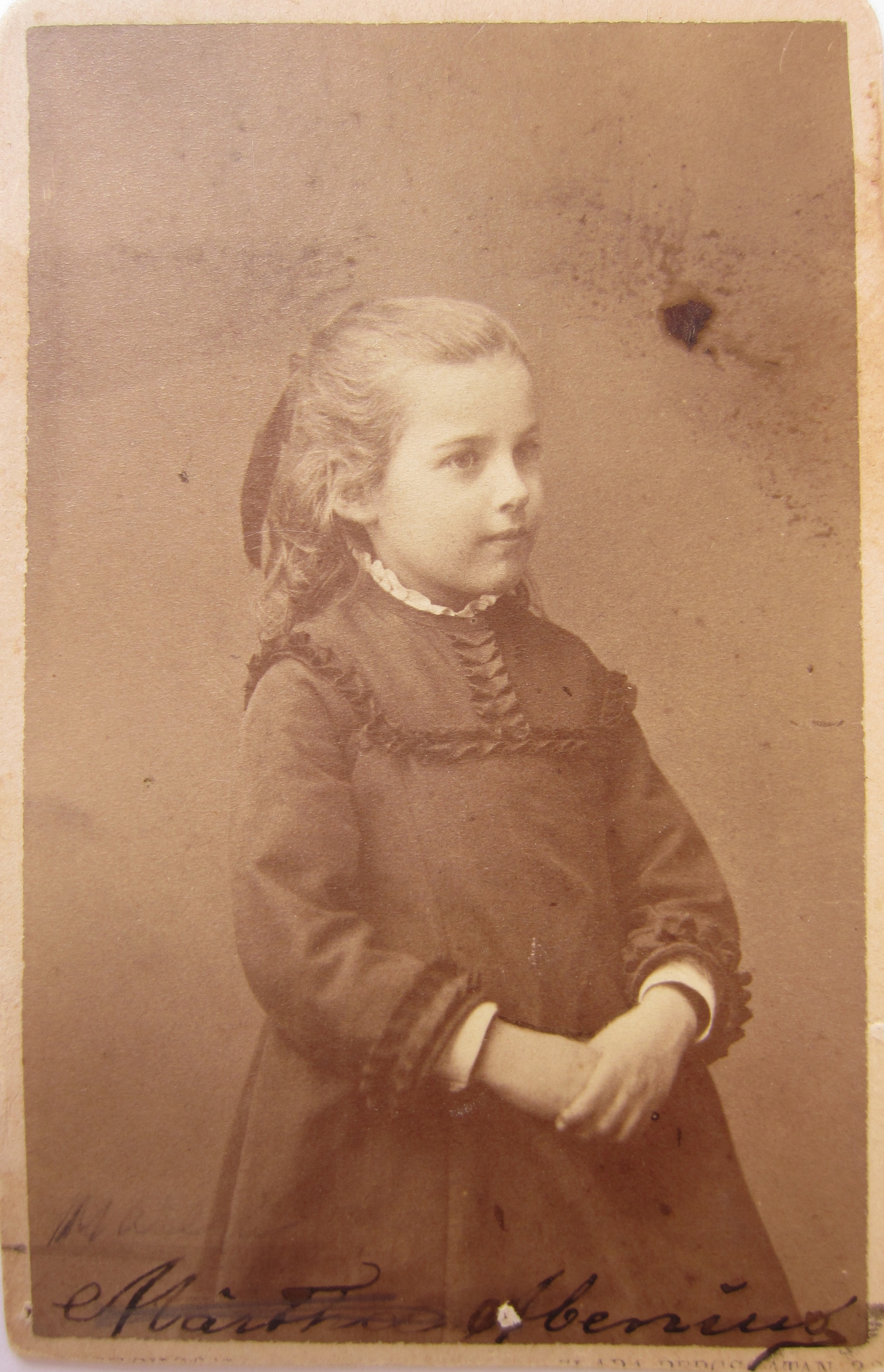 Märta Abenius som barn, HjS 1-41